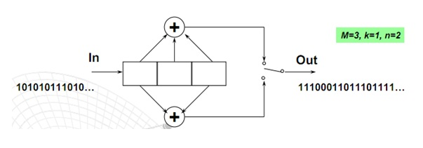 Gràfic d'un codi convolucional